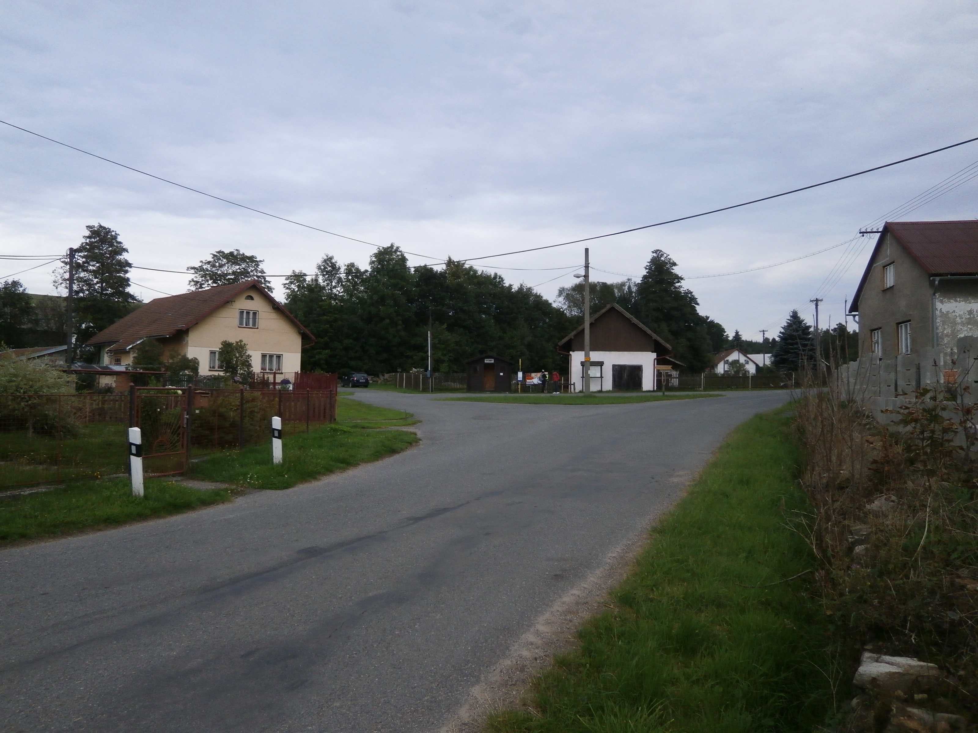 Rychnov - střed obce